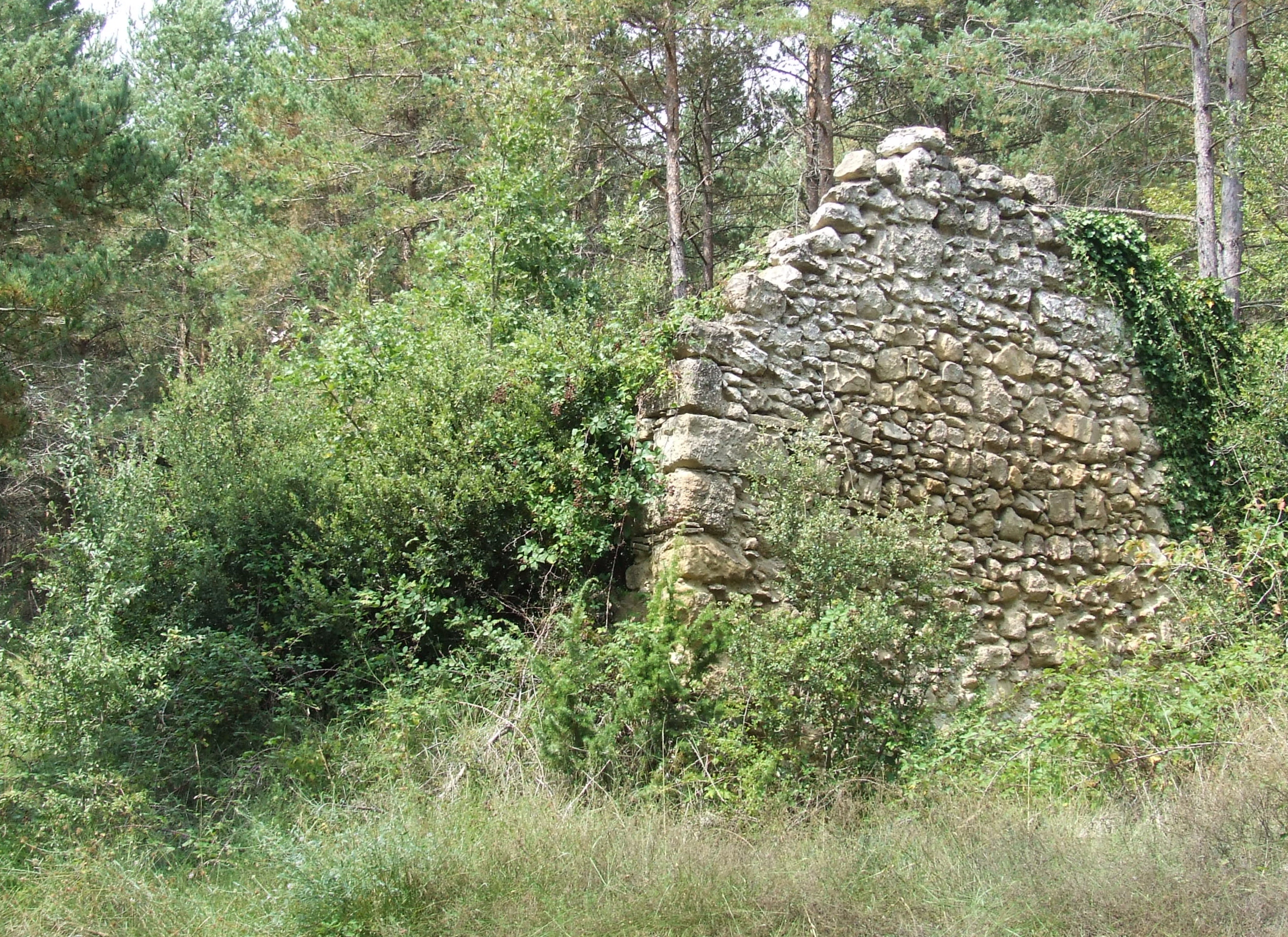 La Tuna (Castellcir, Moianès)